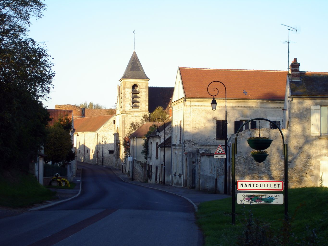 Entrée du village de Nantouillet, Seine-et-Marne (France) - Novembre 2006 Photo personnelle de clicsouris